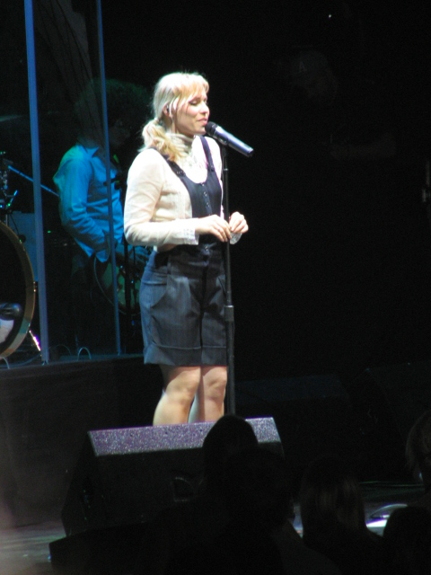 En 2006. Jawa: Natasha Bedingfield nalika tampil ing taun 2006.